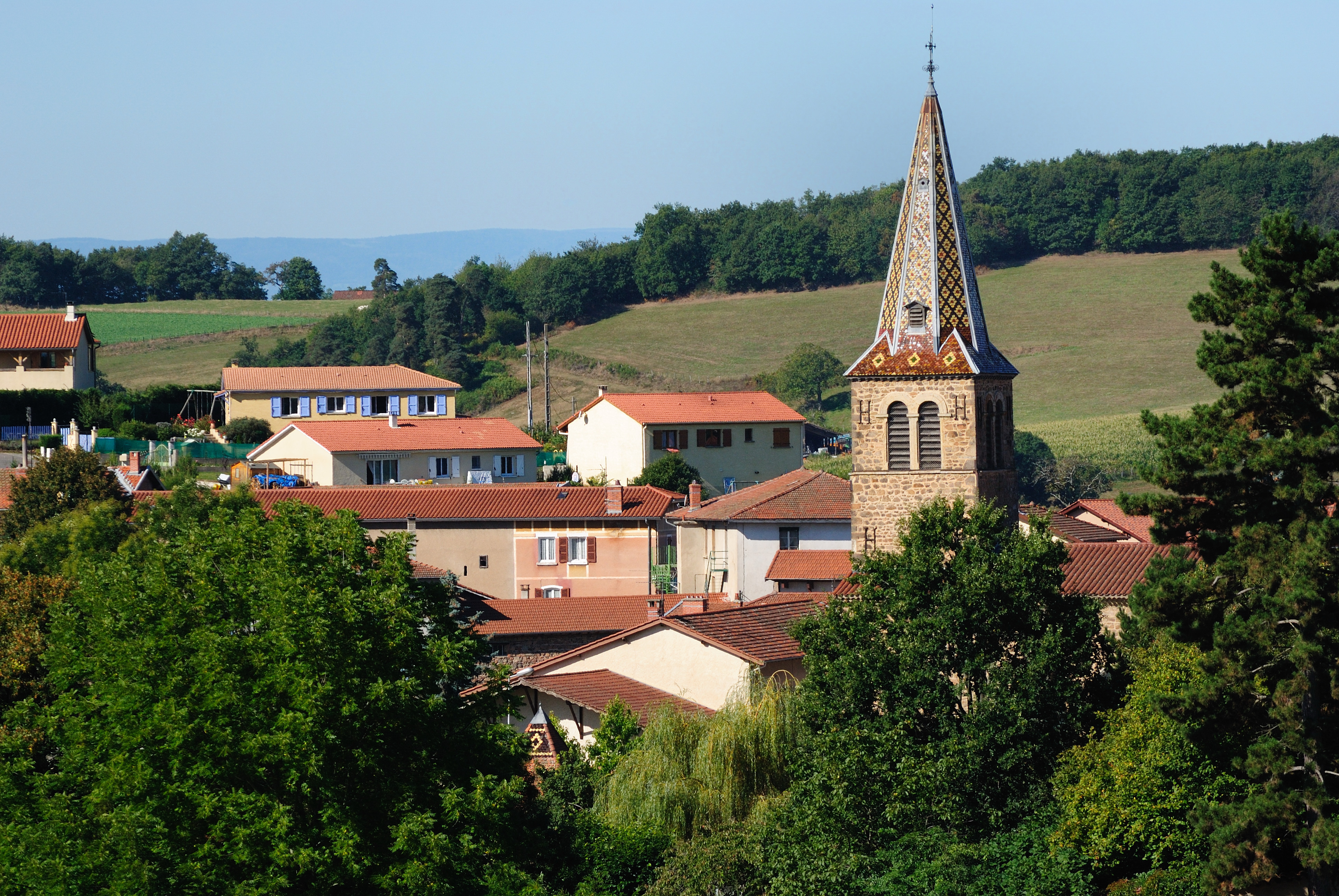 le clocher des Halles, dans le Rhône